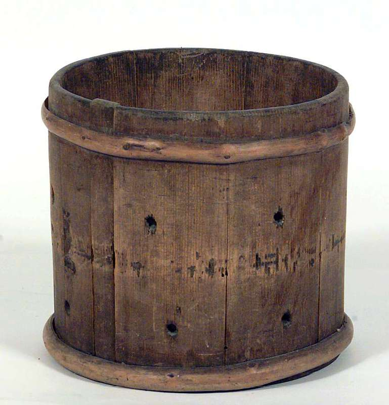 Lagget ostekolle. Diameter 17,5 cm. Foto Norsk Folkemuseum, NF.1917-0300.